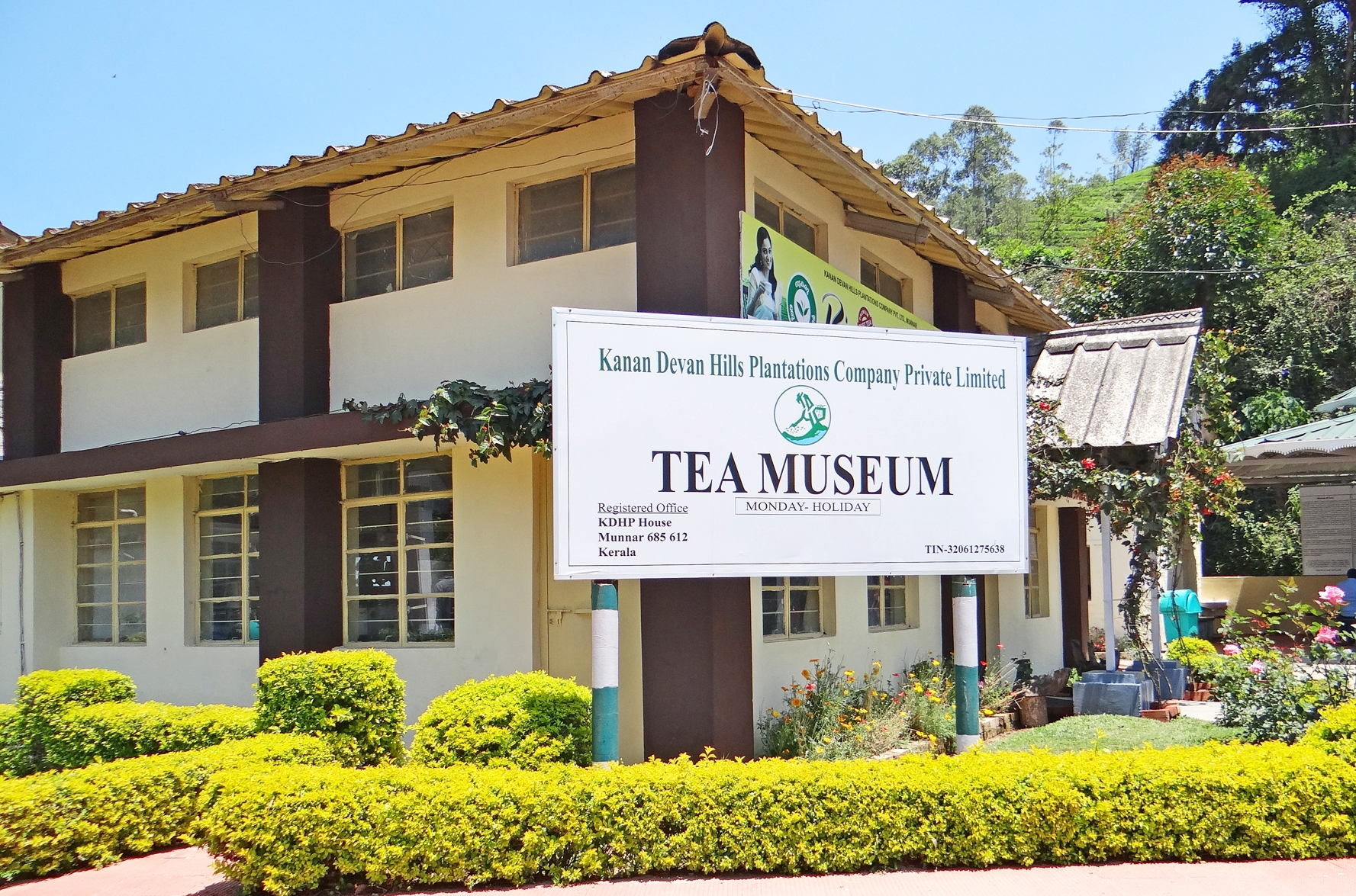 Le musée du thé (Tea Museum) est un musée privé situé au coeur des plantations de la région de Munnar Il appartient à la société Kanan Devan Hills Plantations Company Private Limited (KDHP) qui a racheté, il y a quelques années, à Tata Tea Limited les plantations de cette région. Ce petit musée présente l'histoire du site avec des photographies anciennes et un film ainsi que des objets (machines à écrire, à calculer, dispositifs électriques...) utilisés par les premiers exploitants anglais qui sont à l'origine de la culture du thé au Kerala. Il montre également une chaine de traitement des feuilles de thé noir selon deux procédés : le procédé orthodoxe et le procédé CTC (Crush, Tear and Curl). Au cours de la visite, il est évoqué la manière de fabriquer le thé vert et le thé blanc. Une boutique permet d'acheter différentes sortes de thé. Dans les années 1930, s’inspirant des machines développées au siècle dernier pour le procédé Orthodoxe, Sir William McKercher pousse plus loin l’industrialisation de la transformation du thé en mettant au point le procédé CTC, de l’anglais crushing, tearing and curling (broyage, déchiquetage et roulage). Il s’agit de combiner plusieurs étapes de la transformation en 3 étapes simples durant lesquelles les feuilles de thé seront séchées, déchiquetées, oxydées et roulées. Cette technique permet d’augmenter considérablement le rendement de la production en accélérant le processus d’oxydation, en simplifiant le procédé, et en standardisant la qualité. selon